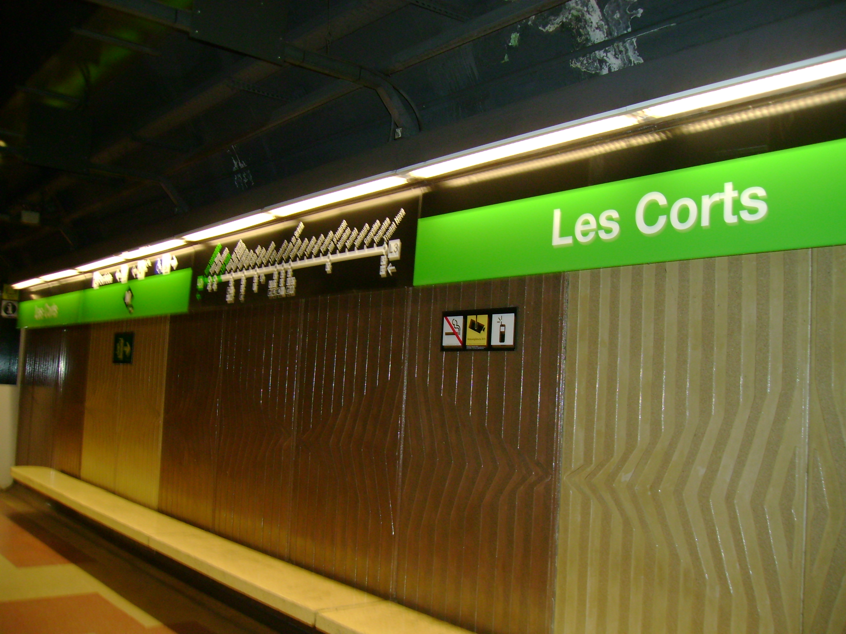 Foto capturada per la meva càmara a l'estació de les Corts (Metro de Barcelona).